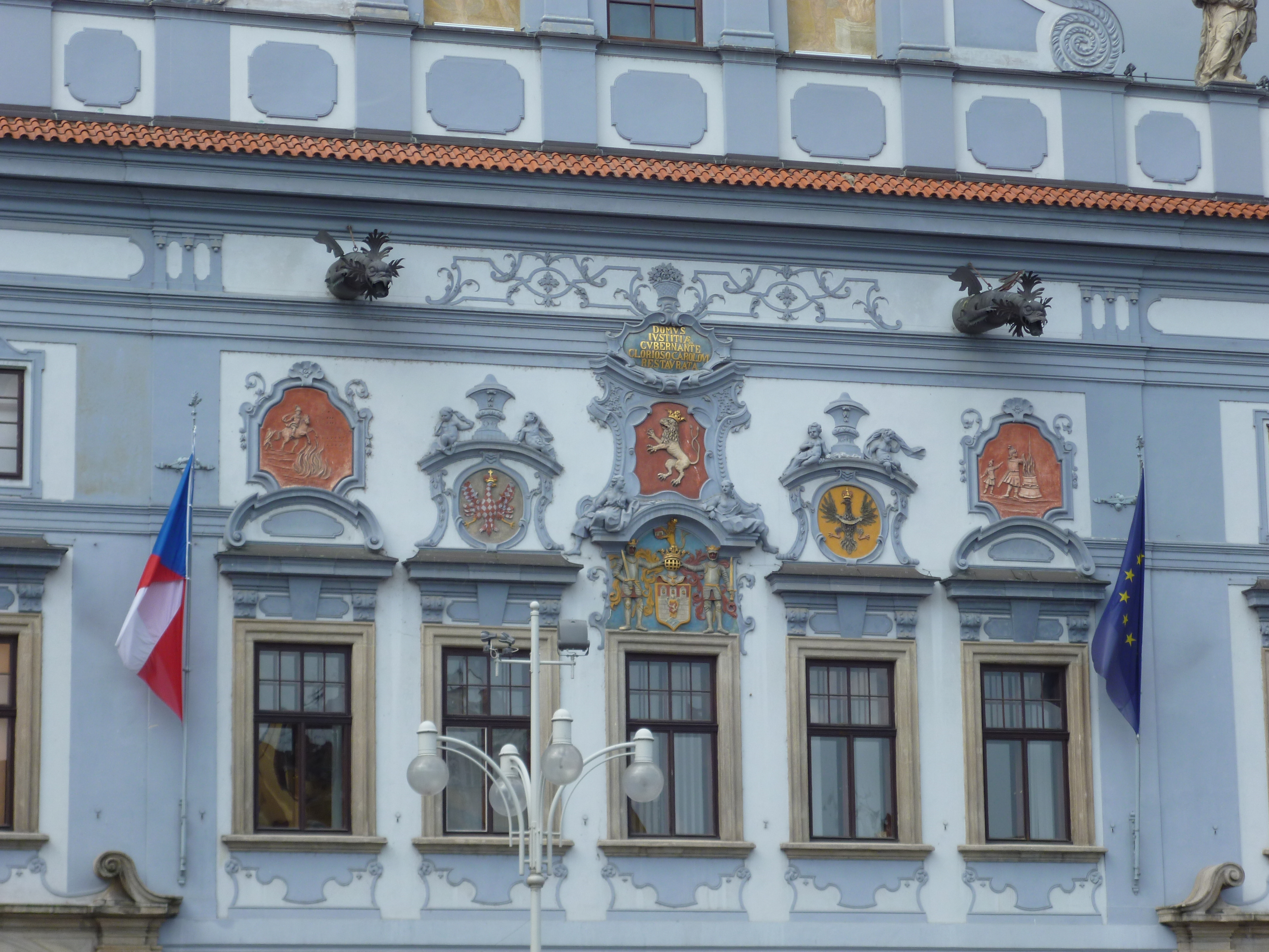 Radnice, nám. Přemysla Otakara II. 1/1